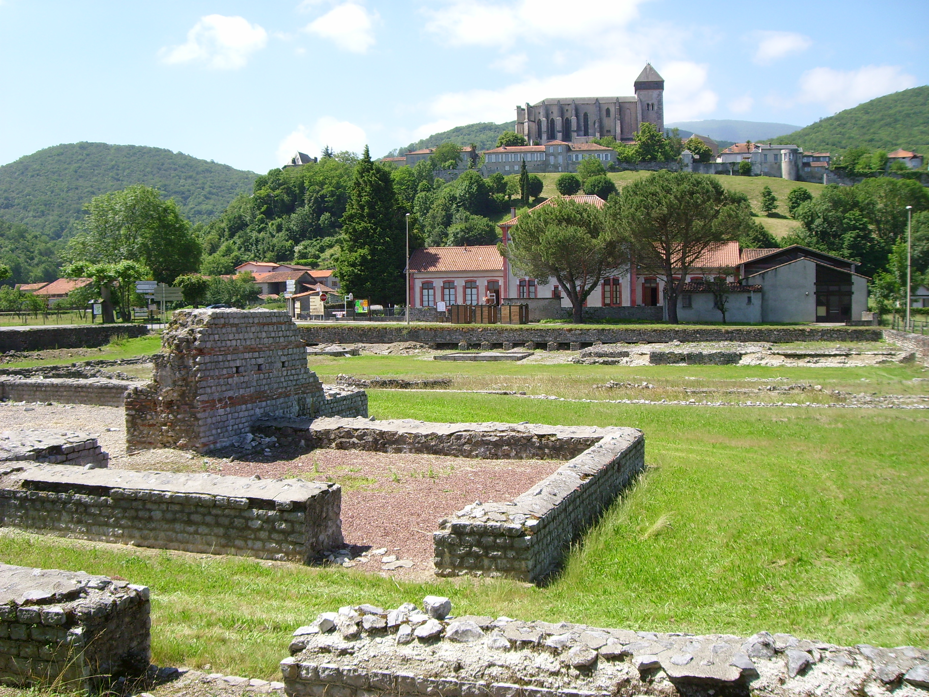 Lugdunum Convenarum : les thermes du forum (au premier plan), le temple et la cité médiévale de Saint-Bertrand-de-Comminges (en arrière-plan)